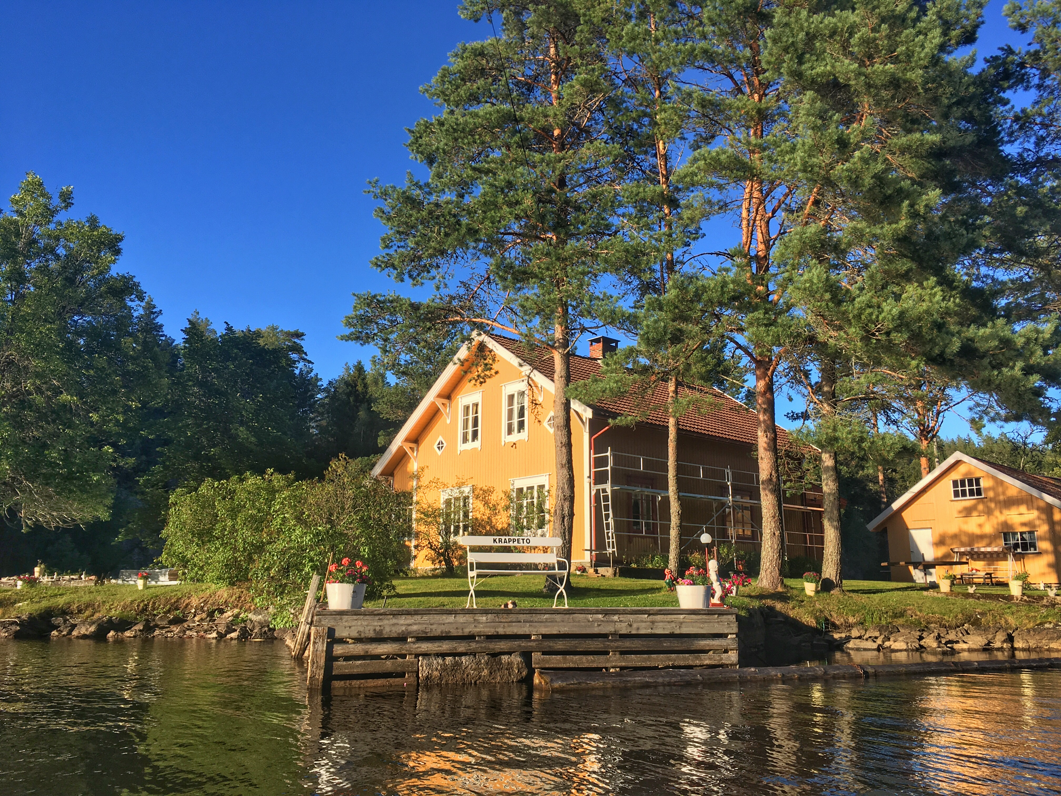 Krappeto zsilipőr háza